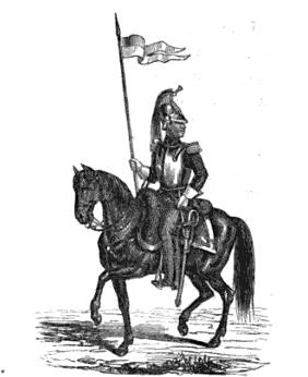 "Zambo, soldado de caballería" grabado peruano de las primeros años de la república, ilustra a un coracero (caballería pesada de la época), armado con sable y lanza. siglo XIX